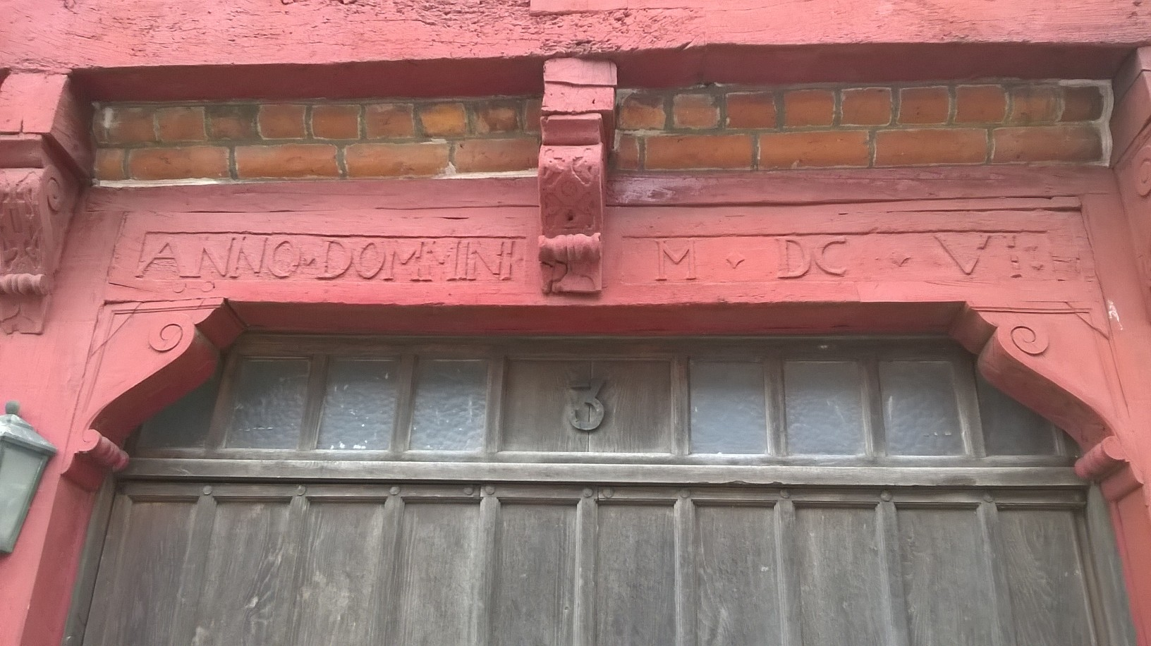 Inskriptionen over døren på Oberst Schwanes Gård i Næstved med inskriptionen "Anno Domini MDCVI" (året 1606)